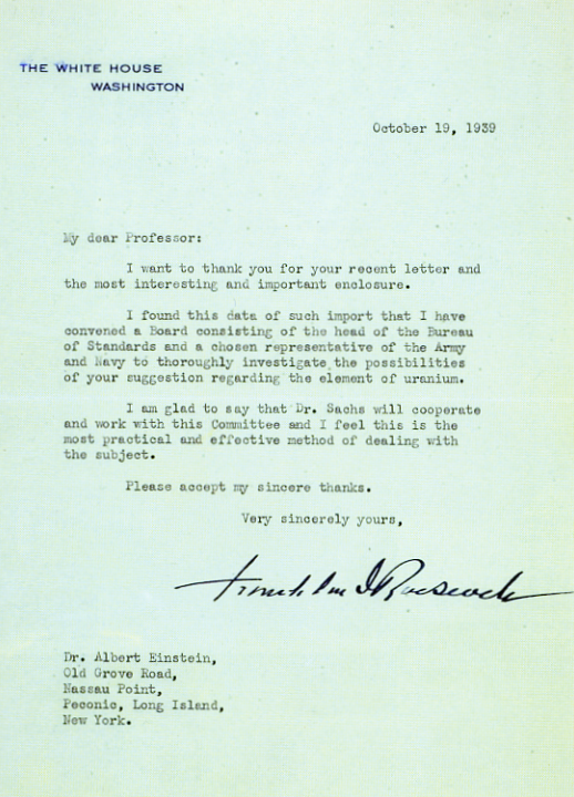 Roosevelt's answer to Einstein's letter